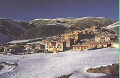 Foto: Andreas Gruschke, Freiburg Erlaubnis erteilt